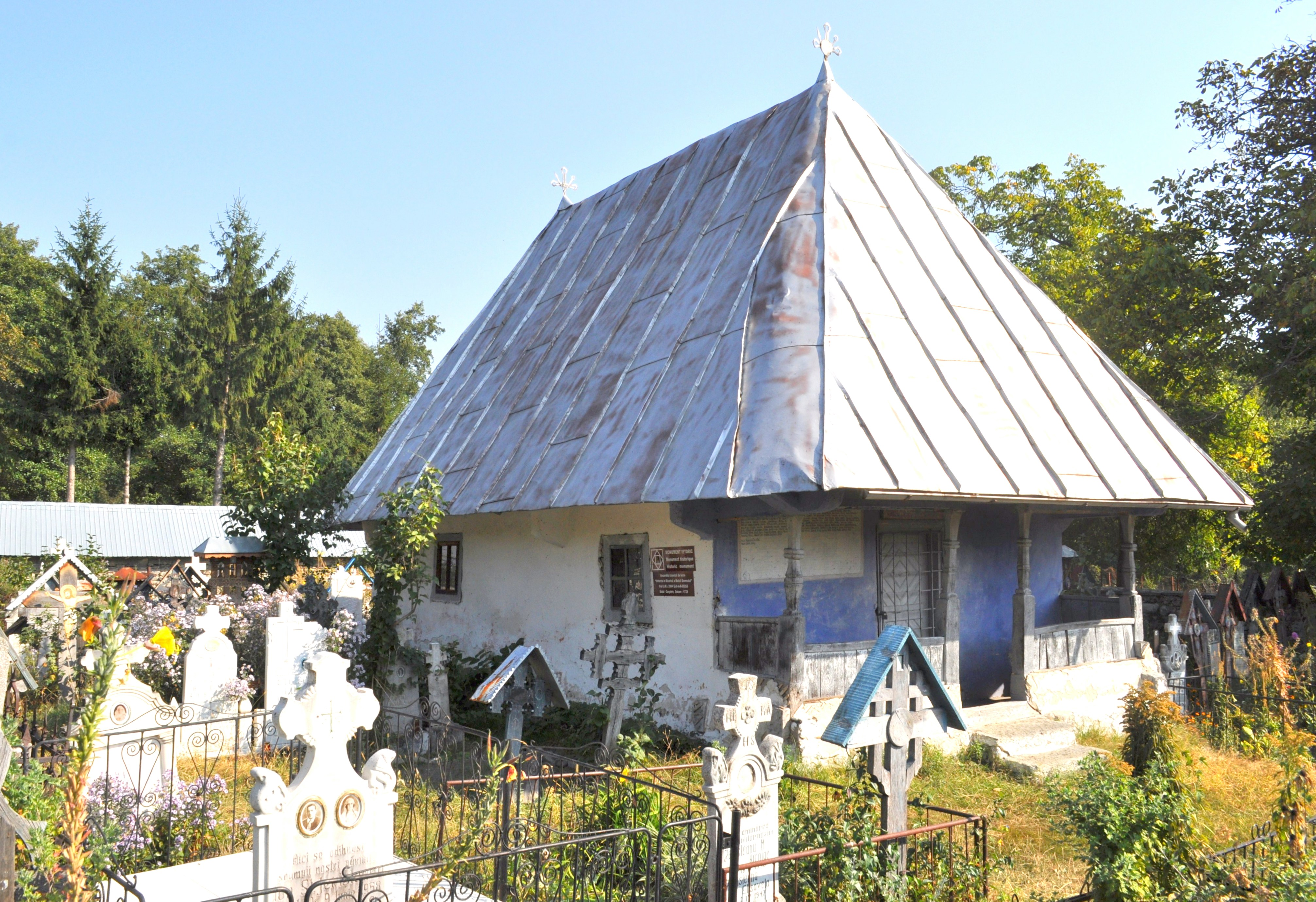 Biserica de lemn Intrarea în Biserică a Maicii Domnului din Cărpiniș, Gorj 01